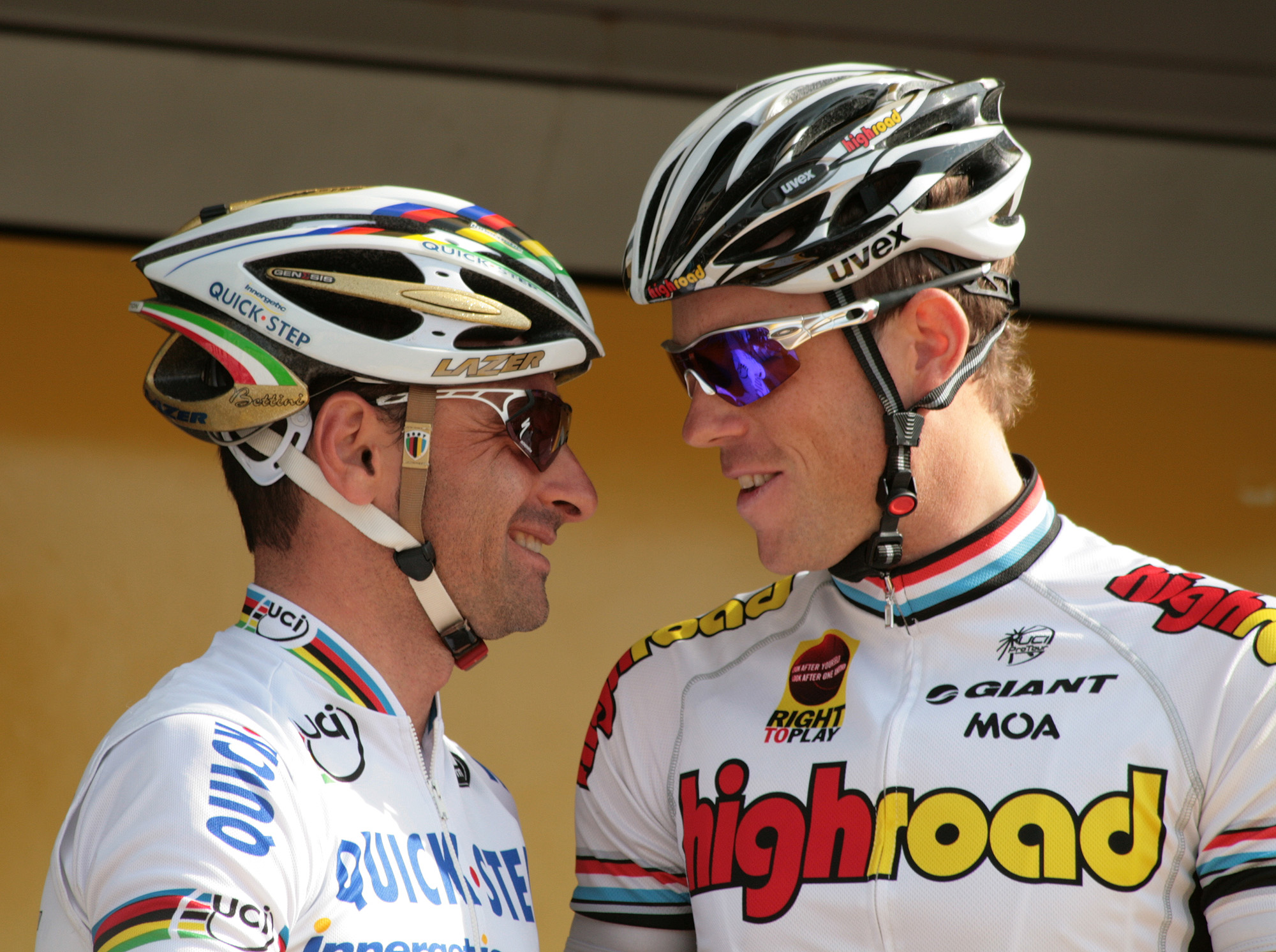 Paolo Bettini & Kim Kirchen voor de start van Luik-Bastenaken-Luik 2008